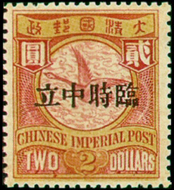 加蓋臨時中立郵票